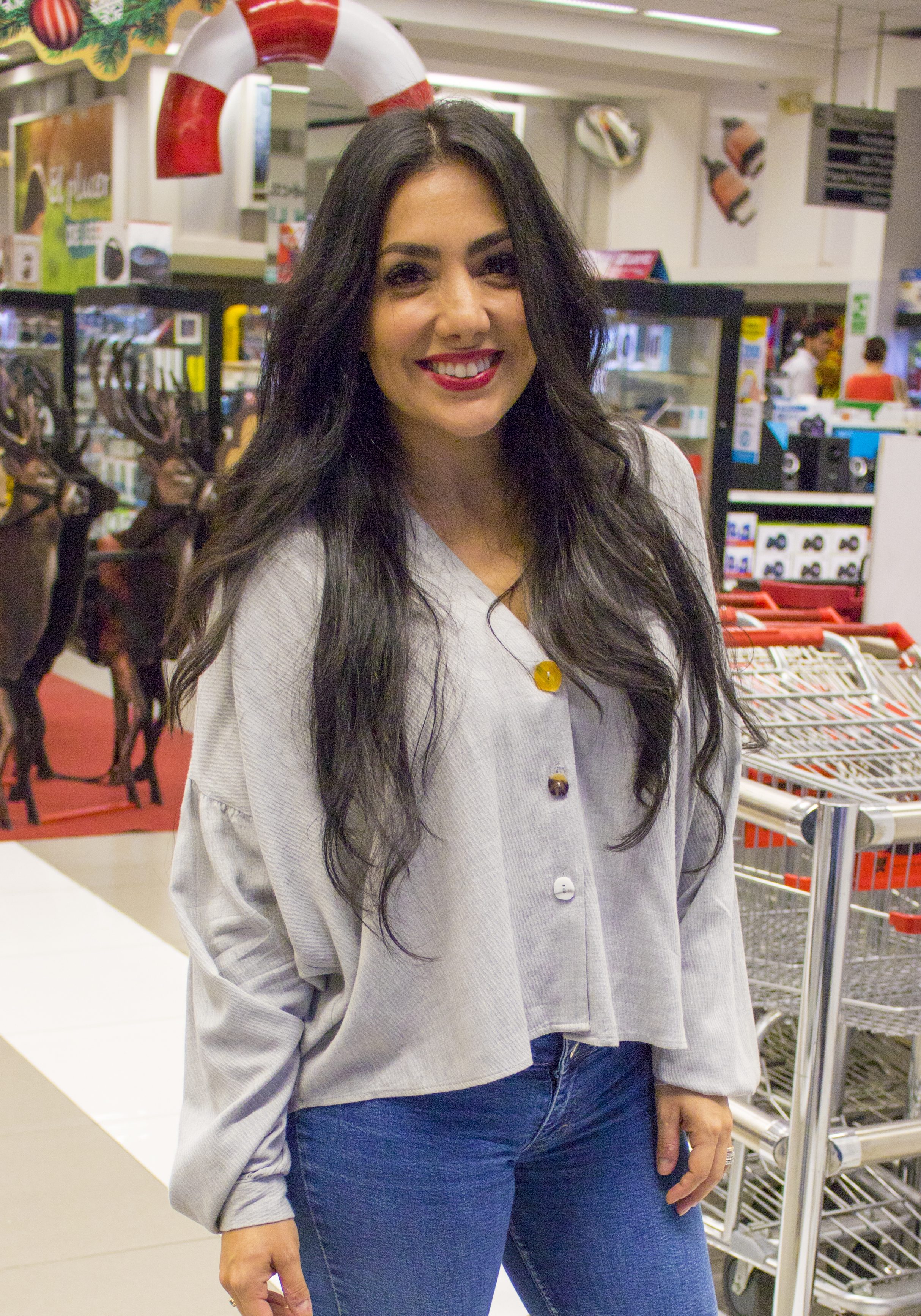 Pamela Cortés en 2018.